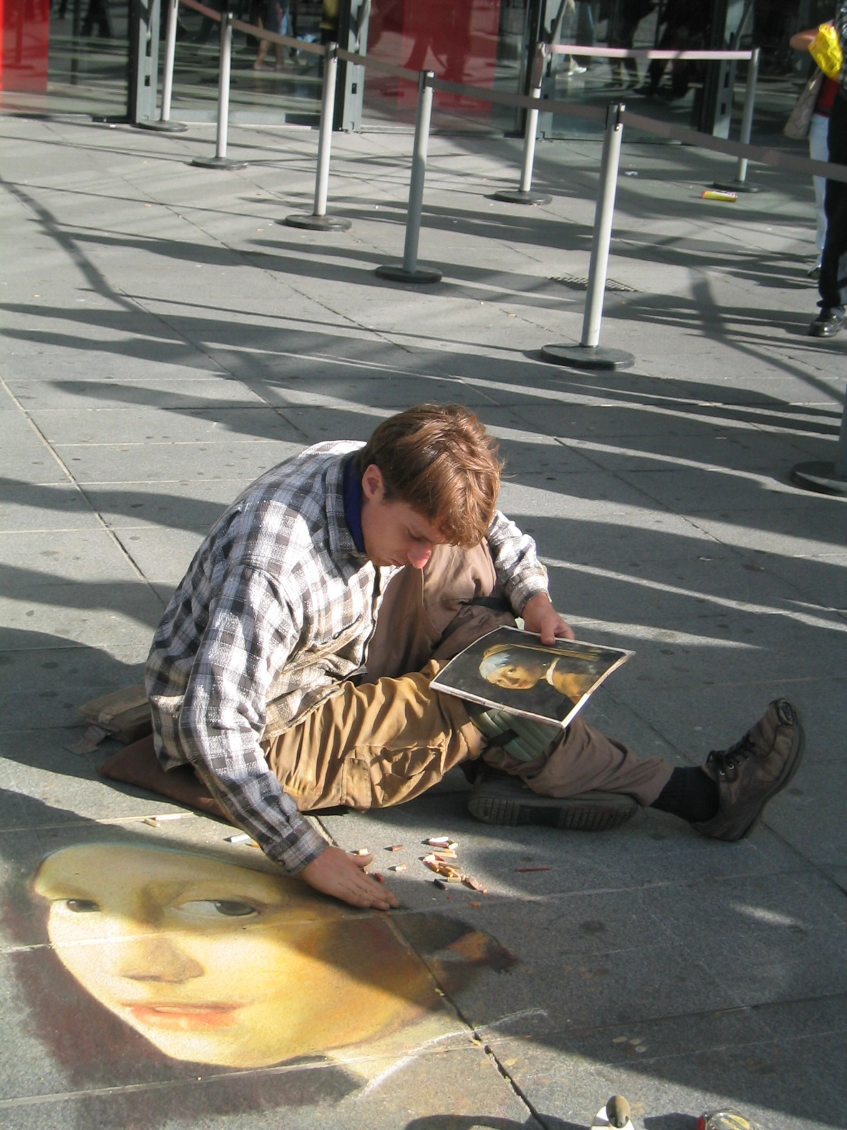 A street artist reproducing Vermeer's Het meisje met de parel at the Centre of Pompidou, Paris